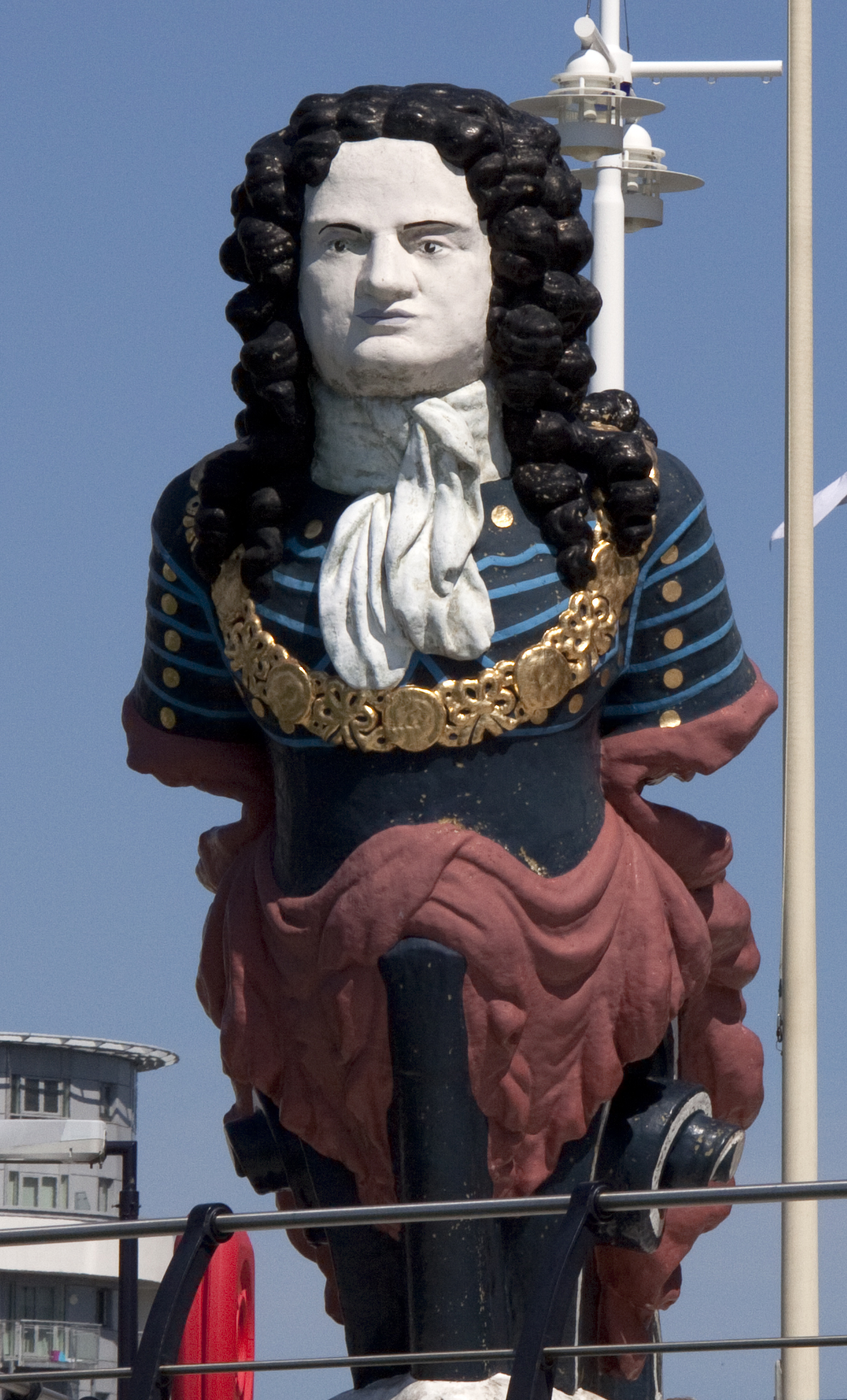 Figurehead